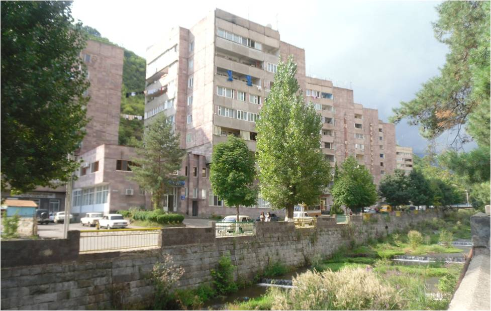 Սմբատ Մելիք-Ստեփանյանի անվան փողոցը Կապանում